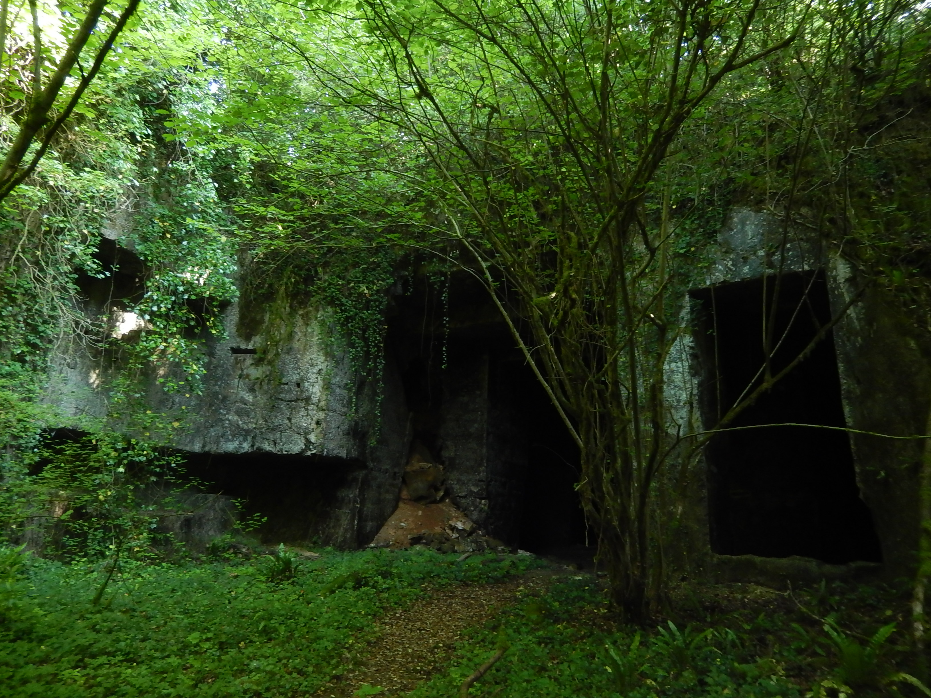 À côté du ruisseau Rochefollet, se trouvent les restes d'anciennes carrières de pierre calcaire (comme il en existe beaucoup dans les environs, dont à Crazannes et Saint-Vaize).